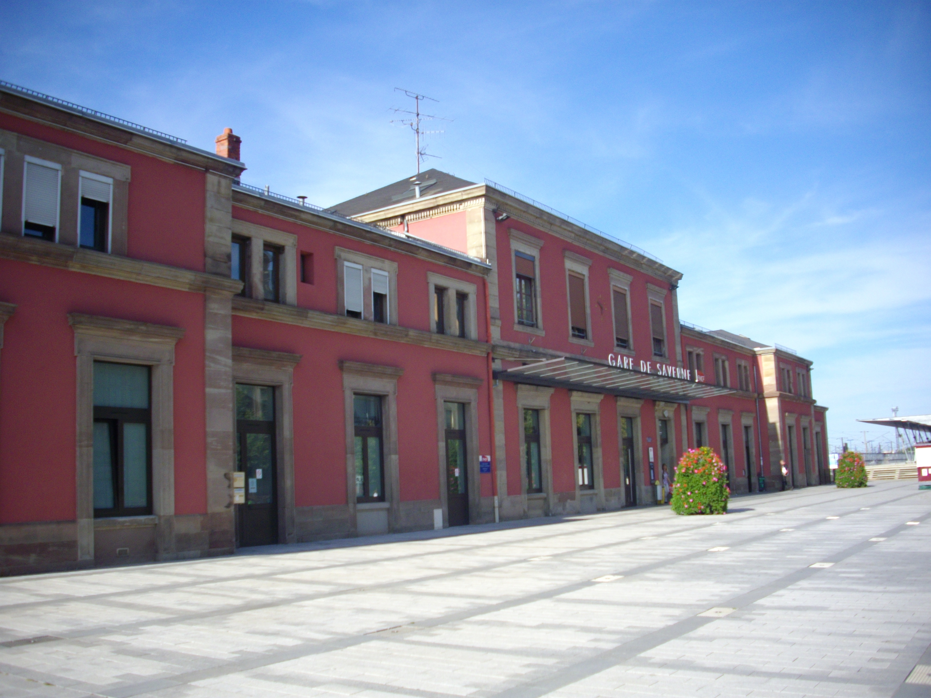 Gare de Saverne (Bas-Rhin, France)